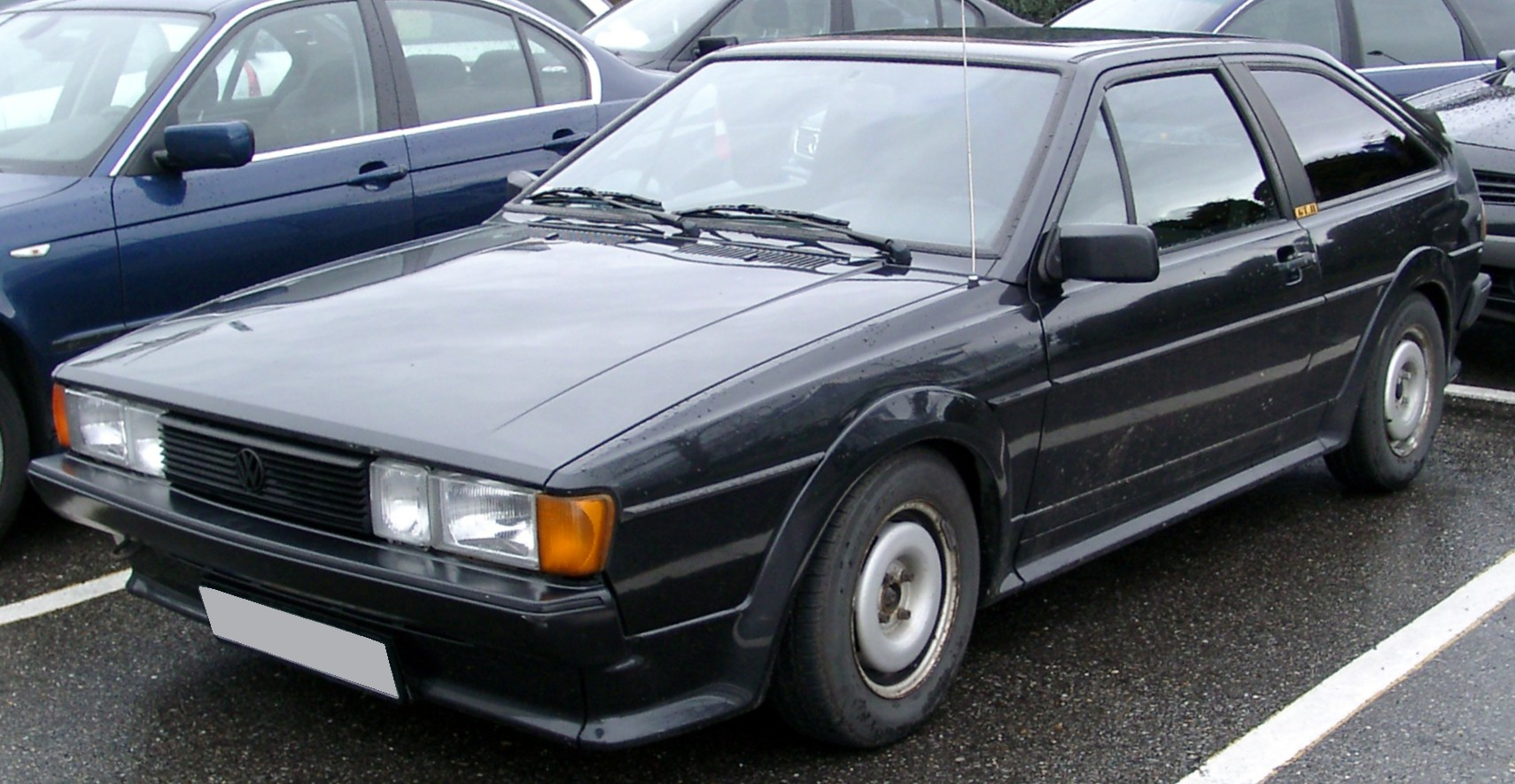 Volkswagen Scirocco, 2. Generation